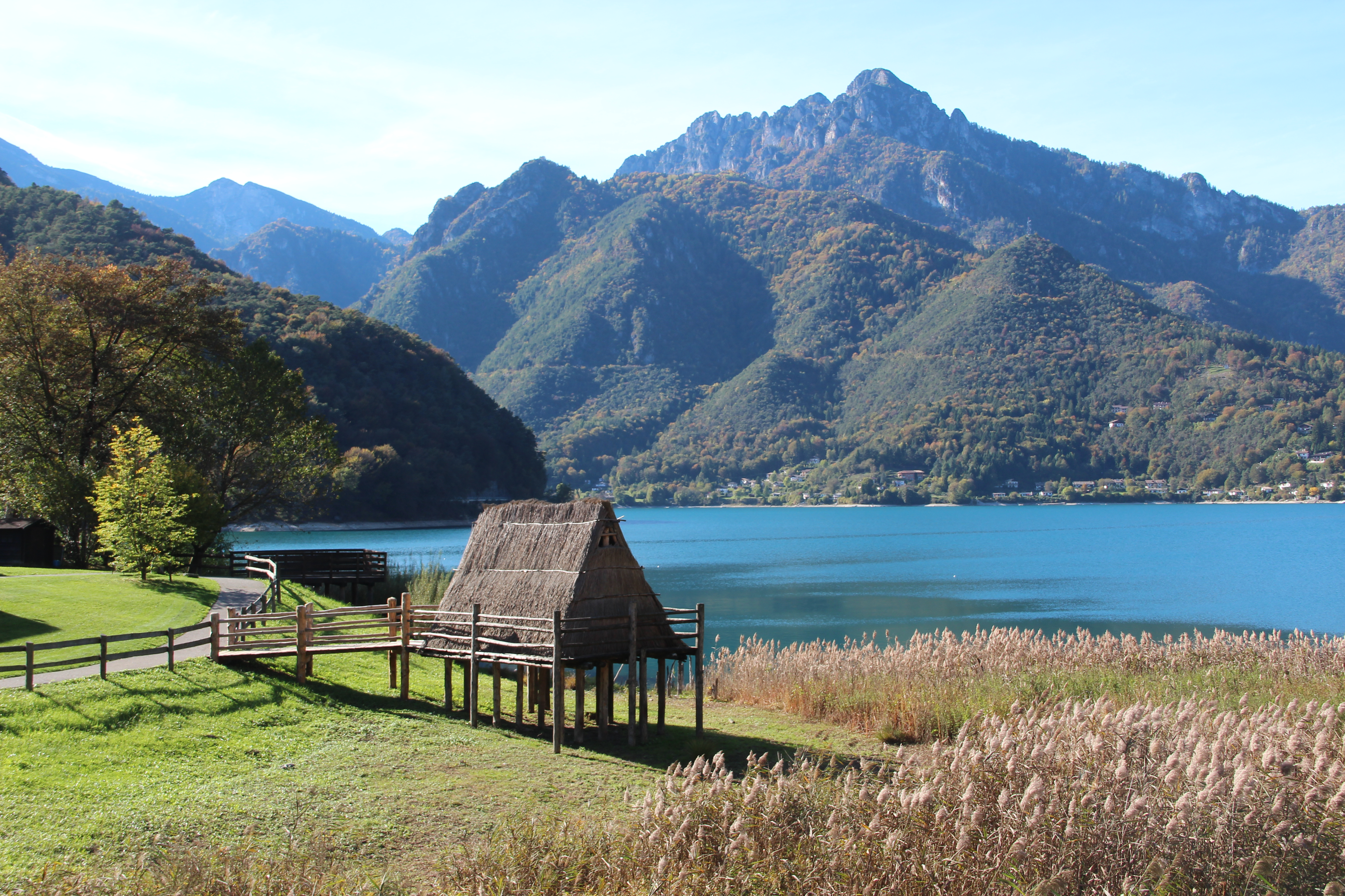 Italien, Molina di Ledro by Niederkasseler